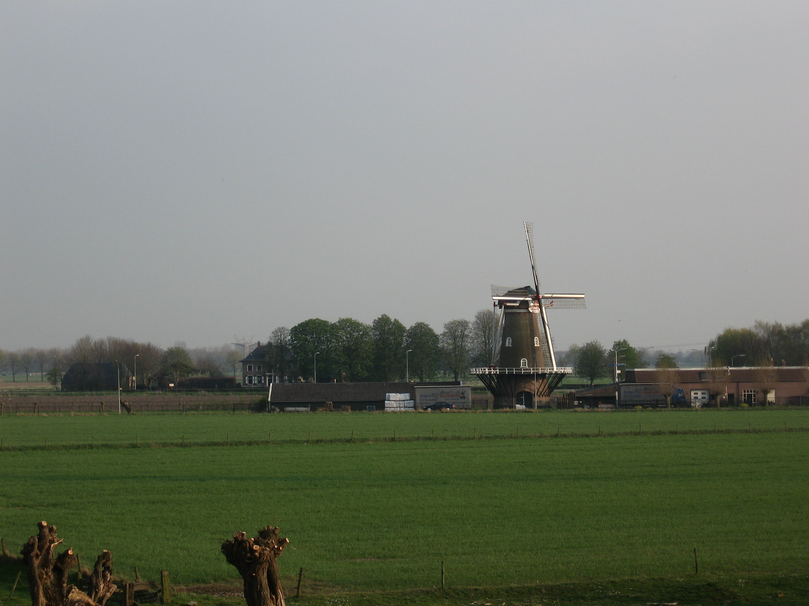 Molen in Afferden (Gld). De foto is genomen vanaf de waalbandijk.